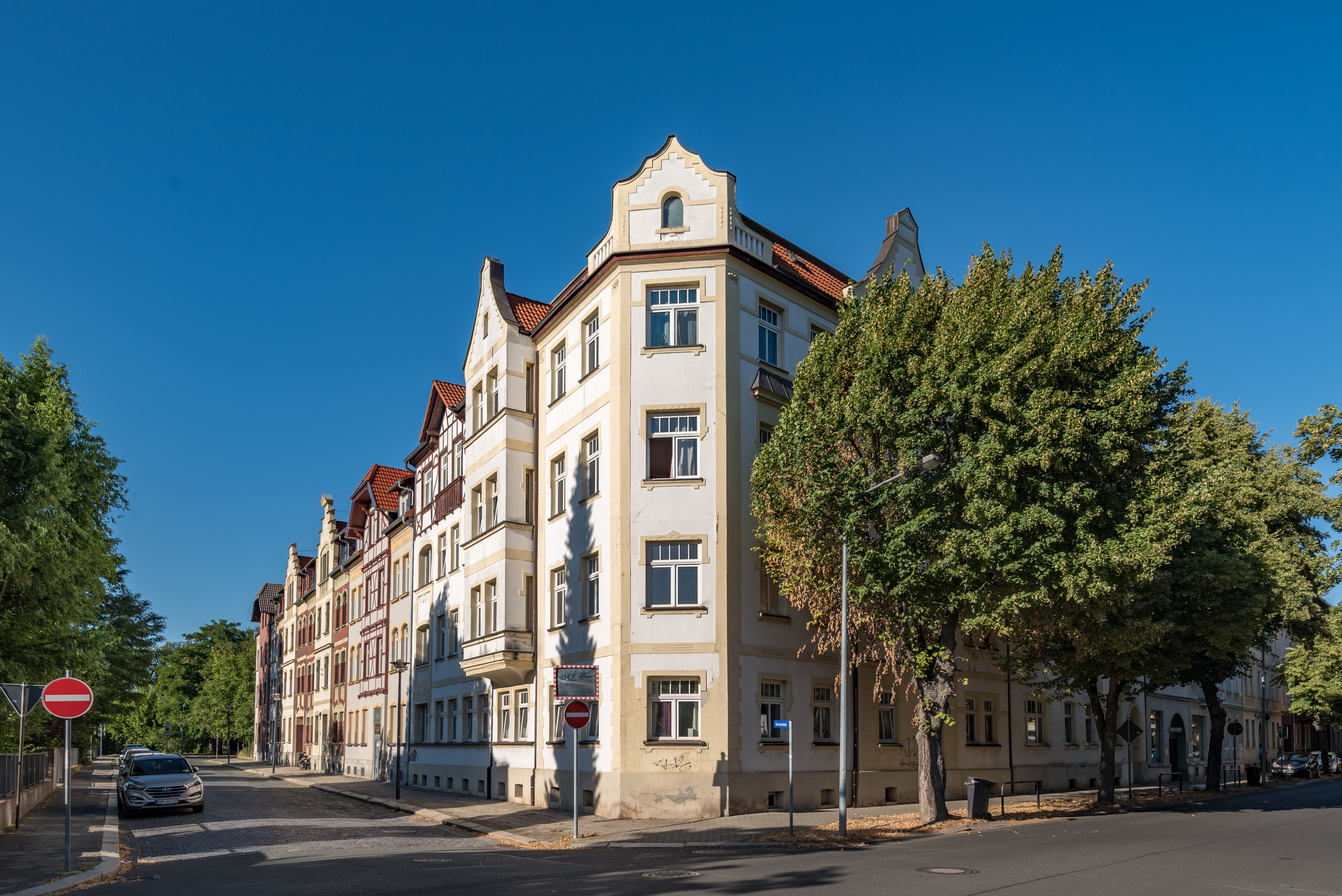 Weißenfels, Beuditzstraße 63